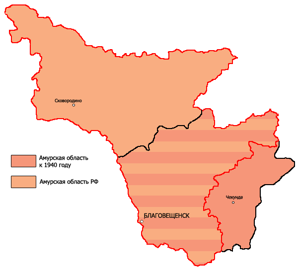 Карта территории Амурской области к 1940 году